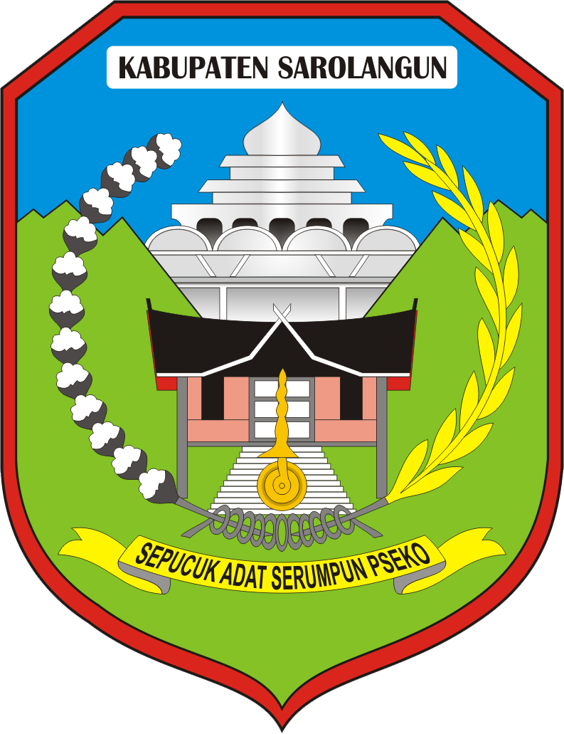 Sarolangun